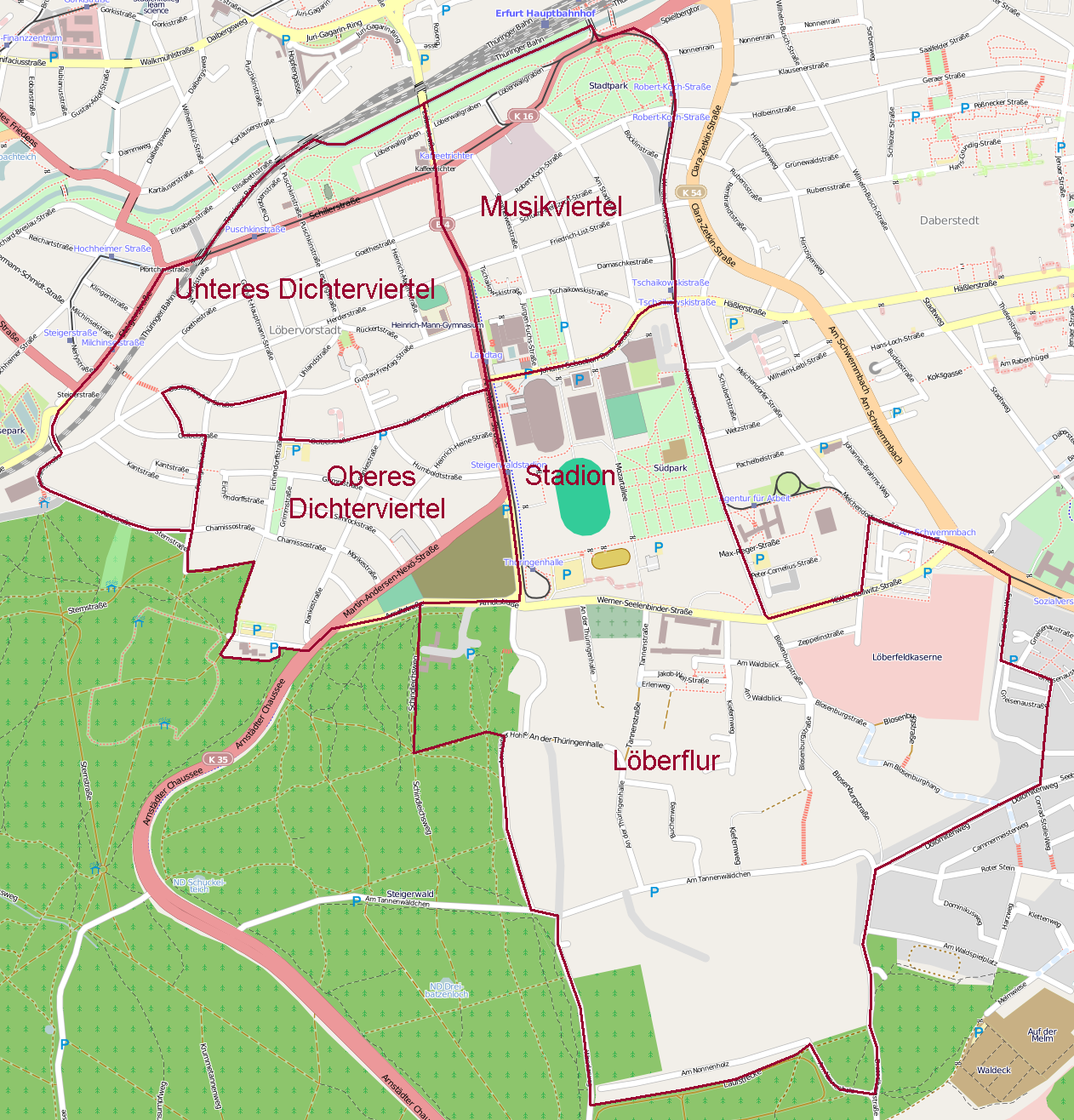 Eine Karte der Viertel im Stadtteil Löbervorstadt von Erfurt.